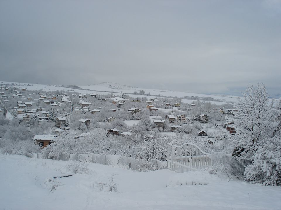 Снежен изглед